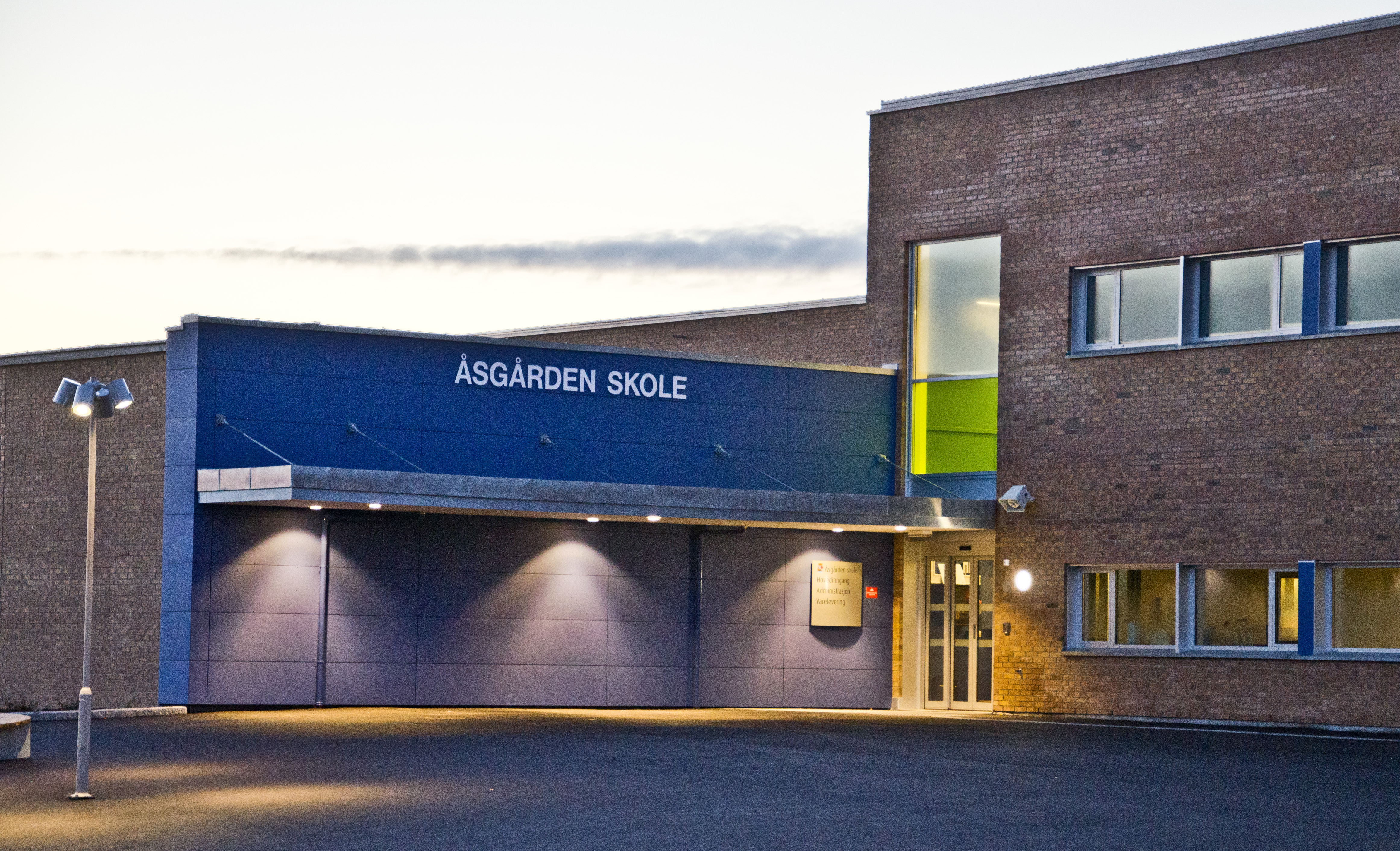 Åsgården skole i Åsgårdstrand, Horten kommune, Vestfold. Bygget i 2012-2013, åpnet oktober 2013.